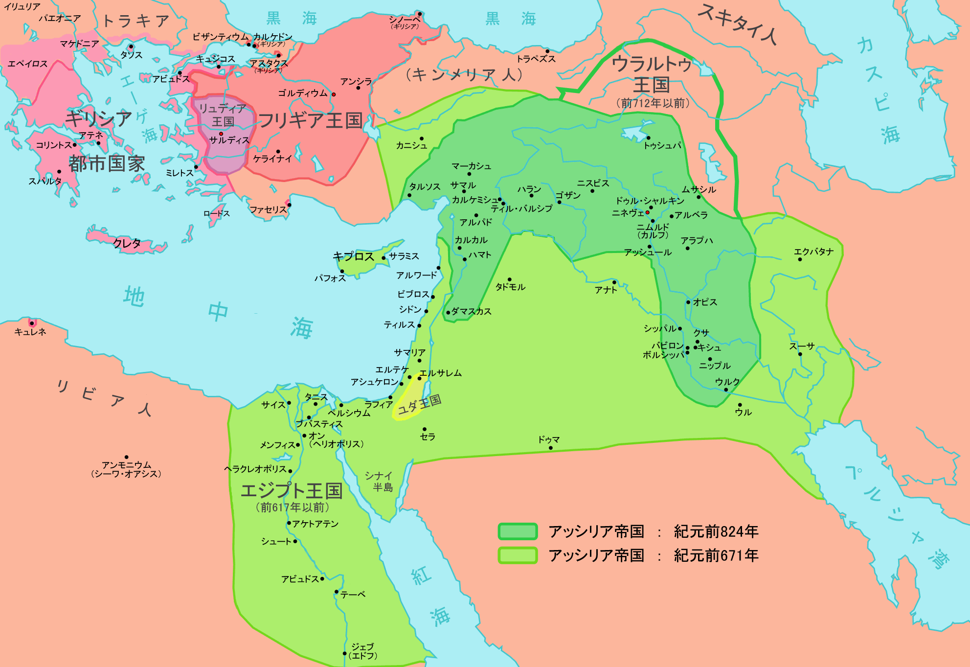 紀元前９～７世紀におけるオリエント世界と、アッシリア帝国の版図を示しています。